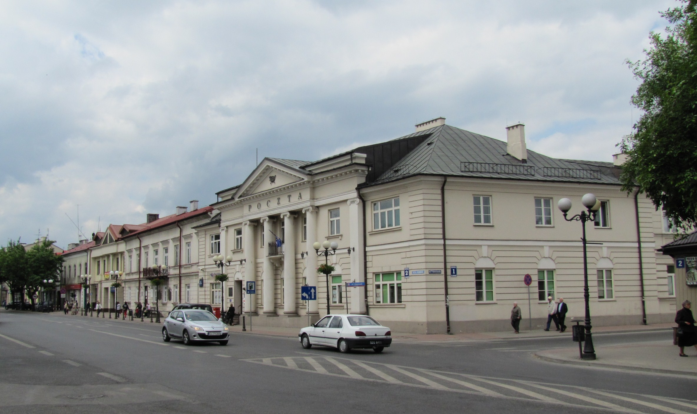 Poczta Polska.